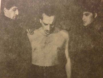 Cortometraje con Beto Gianola.